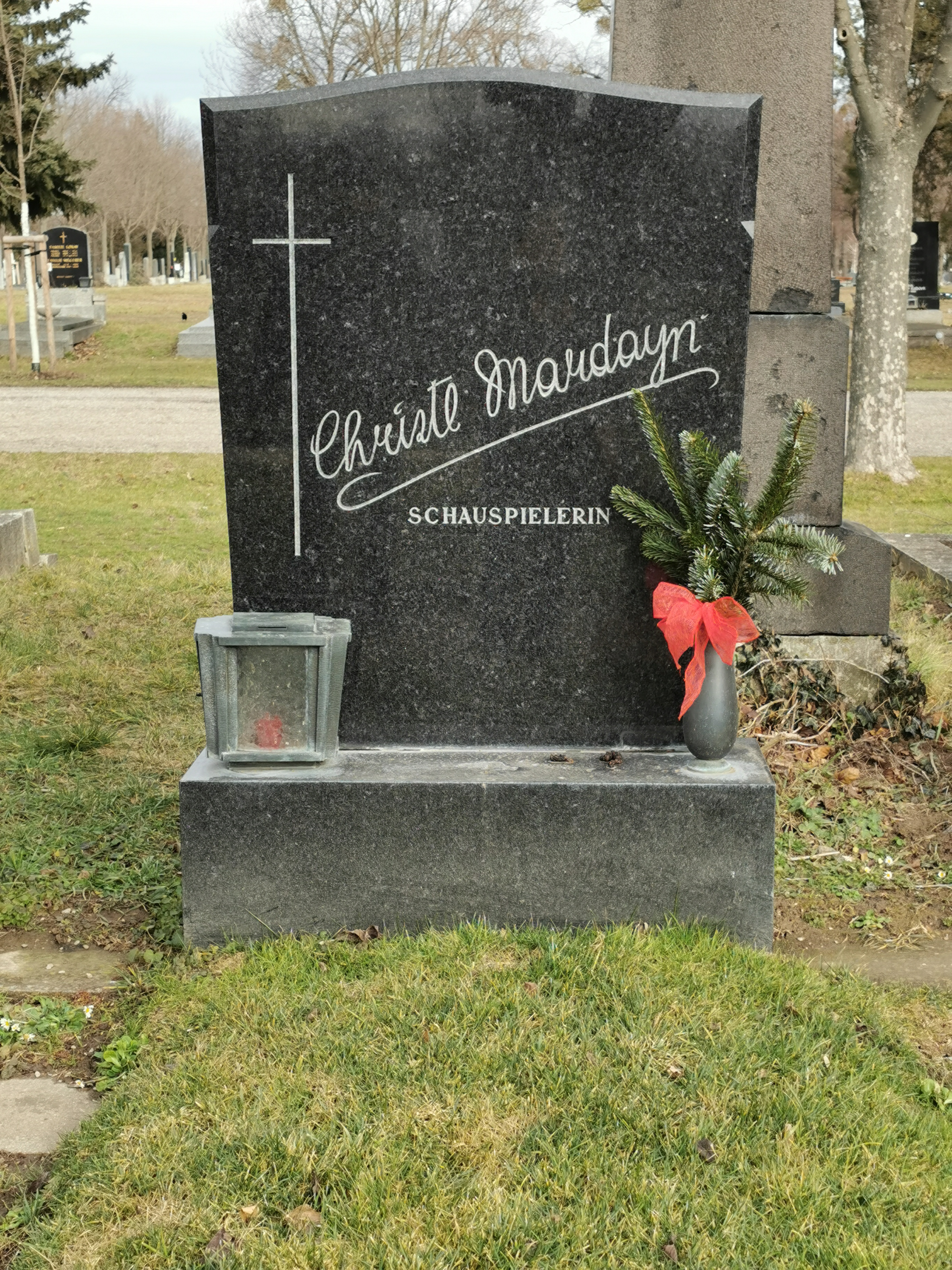 Grab von Christl Mardayn auf dem Wiener Zentralfriedholf